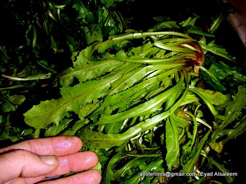 نباتات برية سورية تؤكل